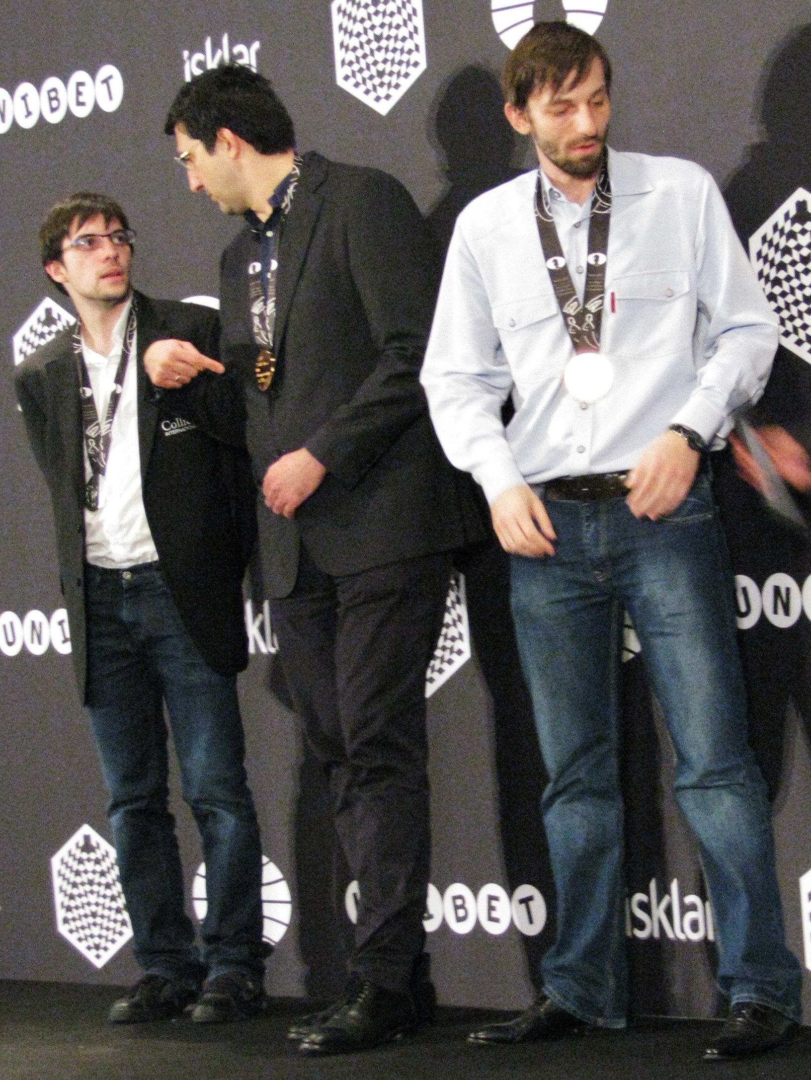 Blitzweltmeister Grischtschuk und die Nächstplatzierten in Berlin 2015